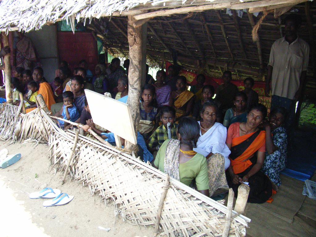 പ്ലാച്ചിമട-സമരപ്പന്തൽ